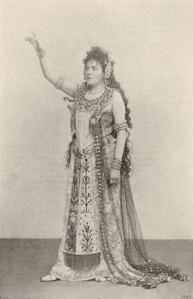 Meyrianne Héglon de l'Opéra en costume de scène